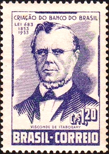 Joaquim José Rodrigues Torres